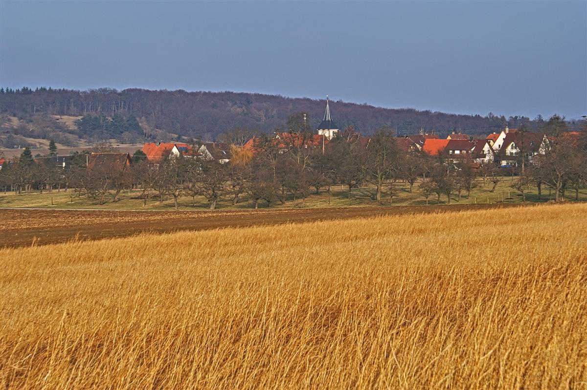 Pinache